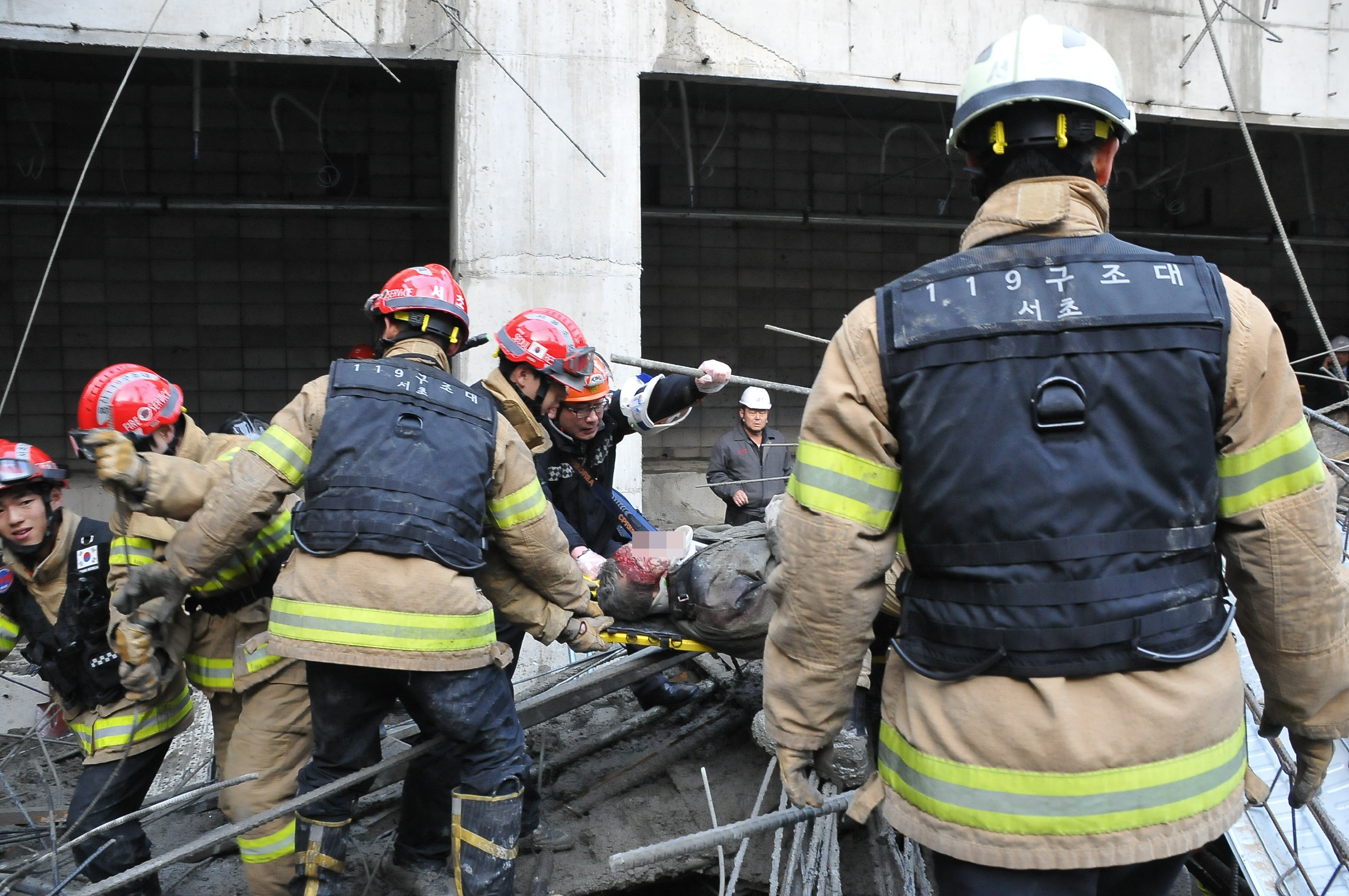 서울특별시 소방재난본부 소장 사진. Photos of Seoul Metropolitan Fire & Disaster Headquarters. 이 파일은 크리에이티브 커먼즈 저작자표시-동일조건변경허락 4.0 국제 라이선스로 배포됩니다. 단 누구인지 구별 가능한 특정 인물이 사진에 포함되어 있을 경우 사용 전에 서울특별시 소방재난본부 및 해당 인물의 승인을 받으셔야합니다. 감사합니다. user:kwangmo.